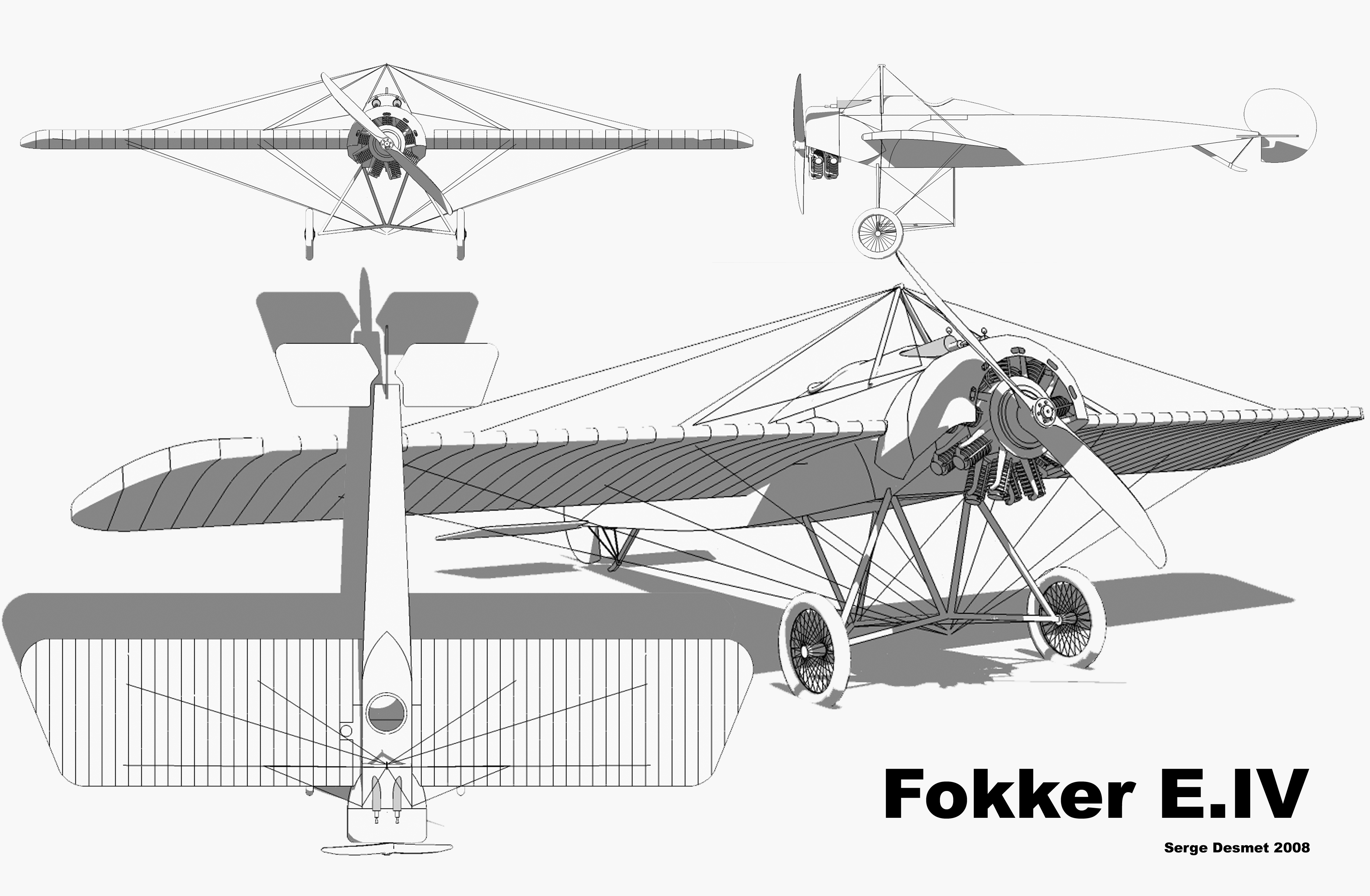 Plan 3 vues du Fokker E.IV